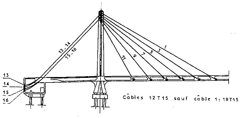 schéma des cables de la passerelle de Meylan